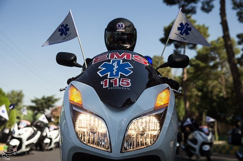 موتورآمبولانس های اورژانس تهران